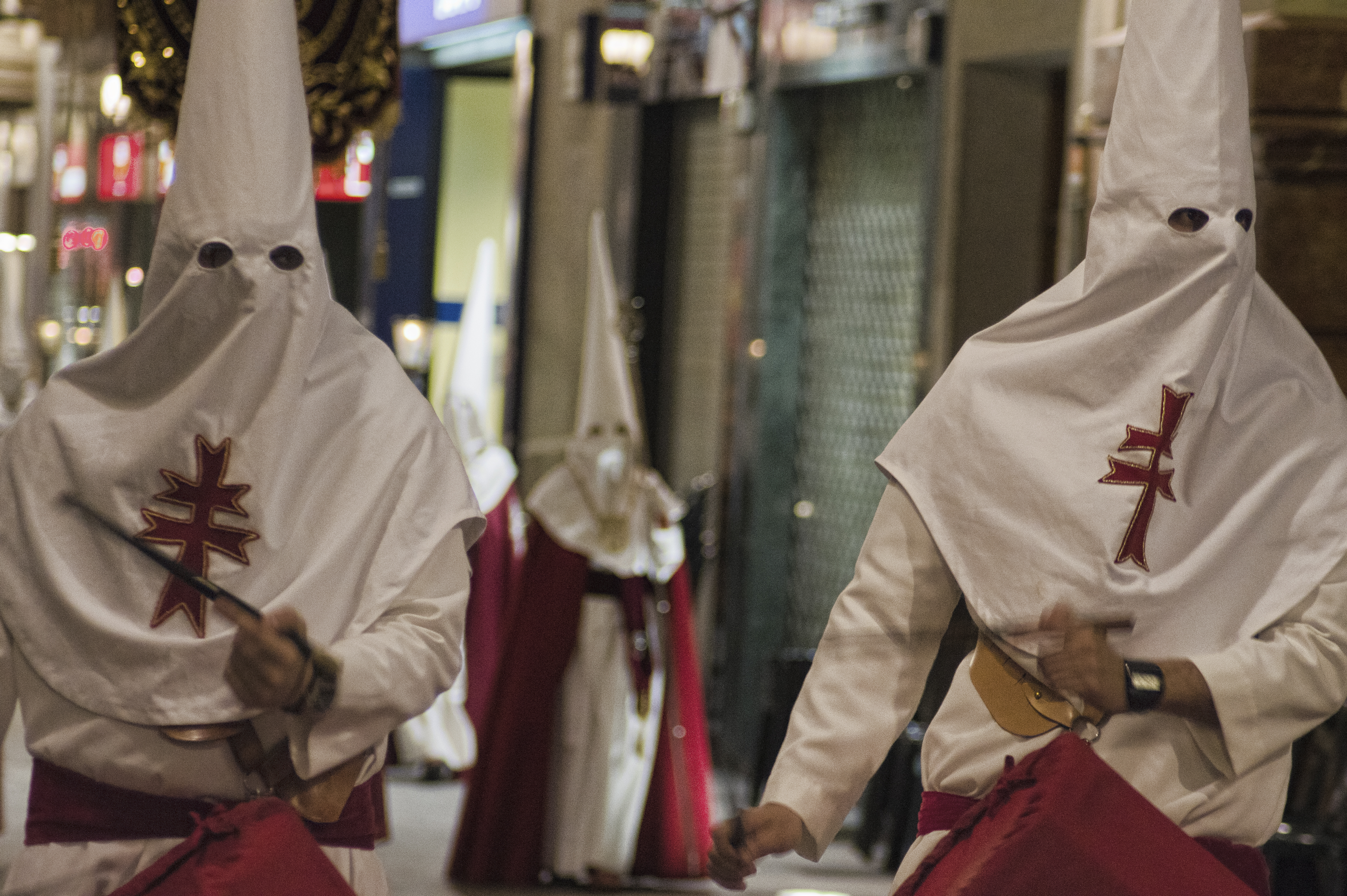 Tambores de la Hermandad del Cristo de la Salud, Murcia, Martes Santo.